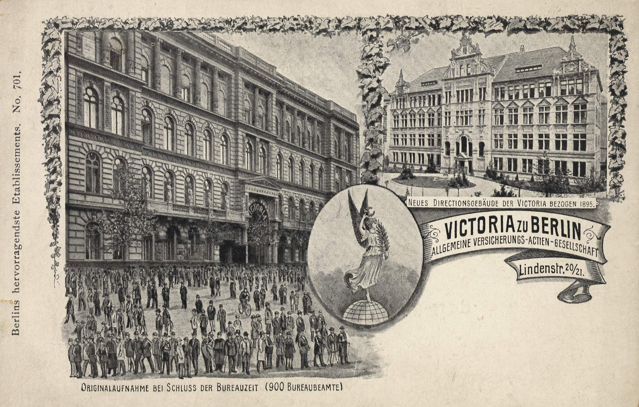 Victoria zu Berlin Allgemeine Versicherungs-Actien-Gesellschaft, Lindenstraße 20-21, Berlin-Kreuzberg